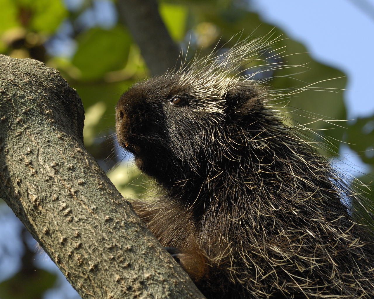 Urson Erethizon dorsatum im Tiergarten Schönbrunn, Wien, Österreich